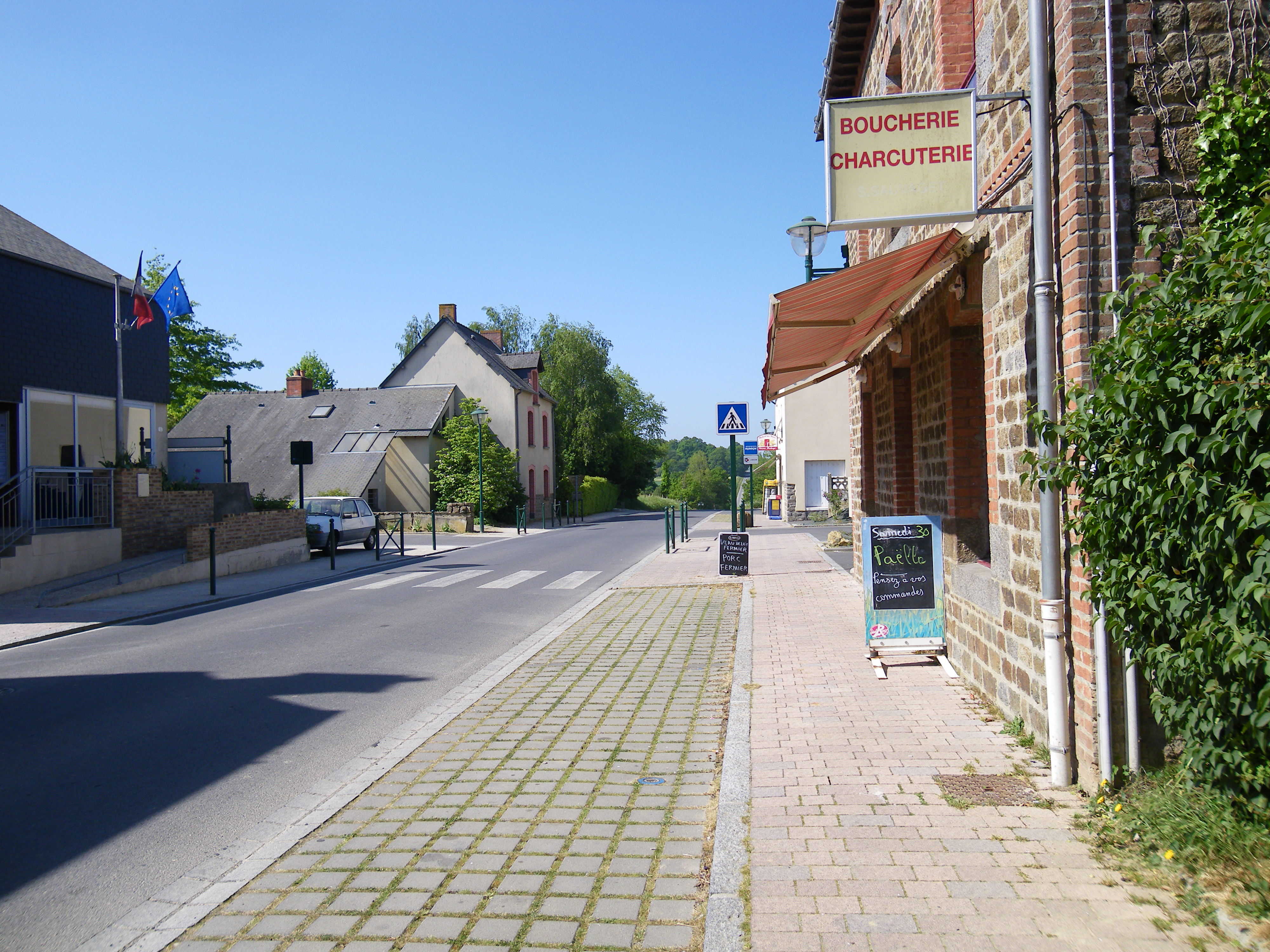 rue de langan